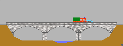 Segmentbogennatursteinbrücke